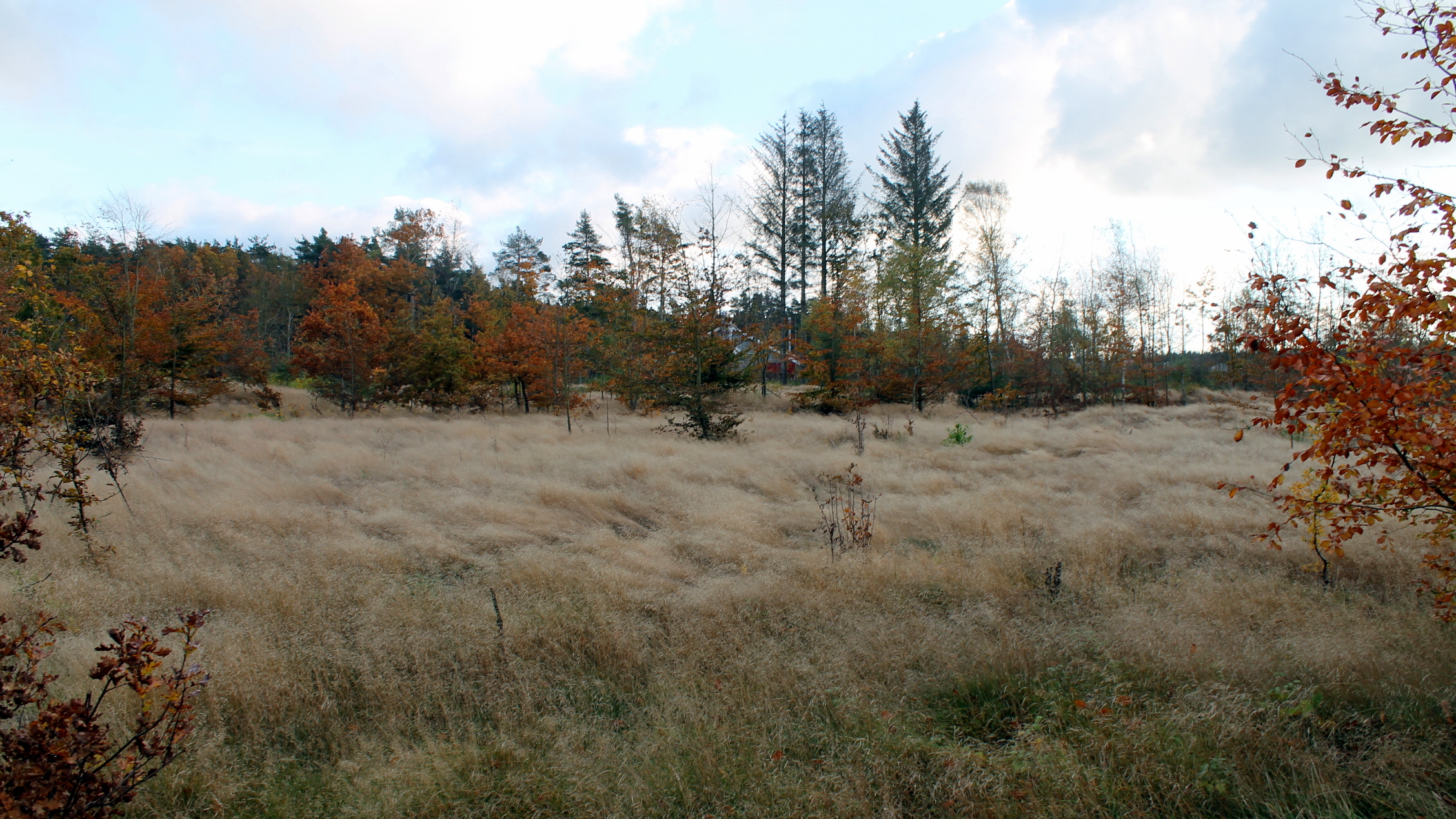 Kragskovhede, et område beliggende umiddelbart vest for landsbyen Jerup, ca. 12 km nordvest for Frederikshavn.